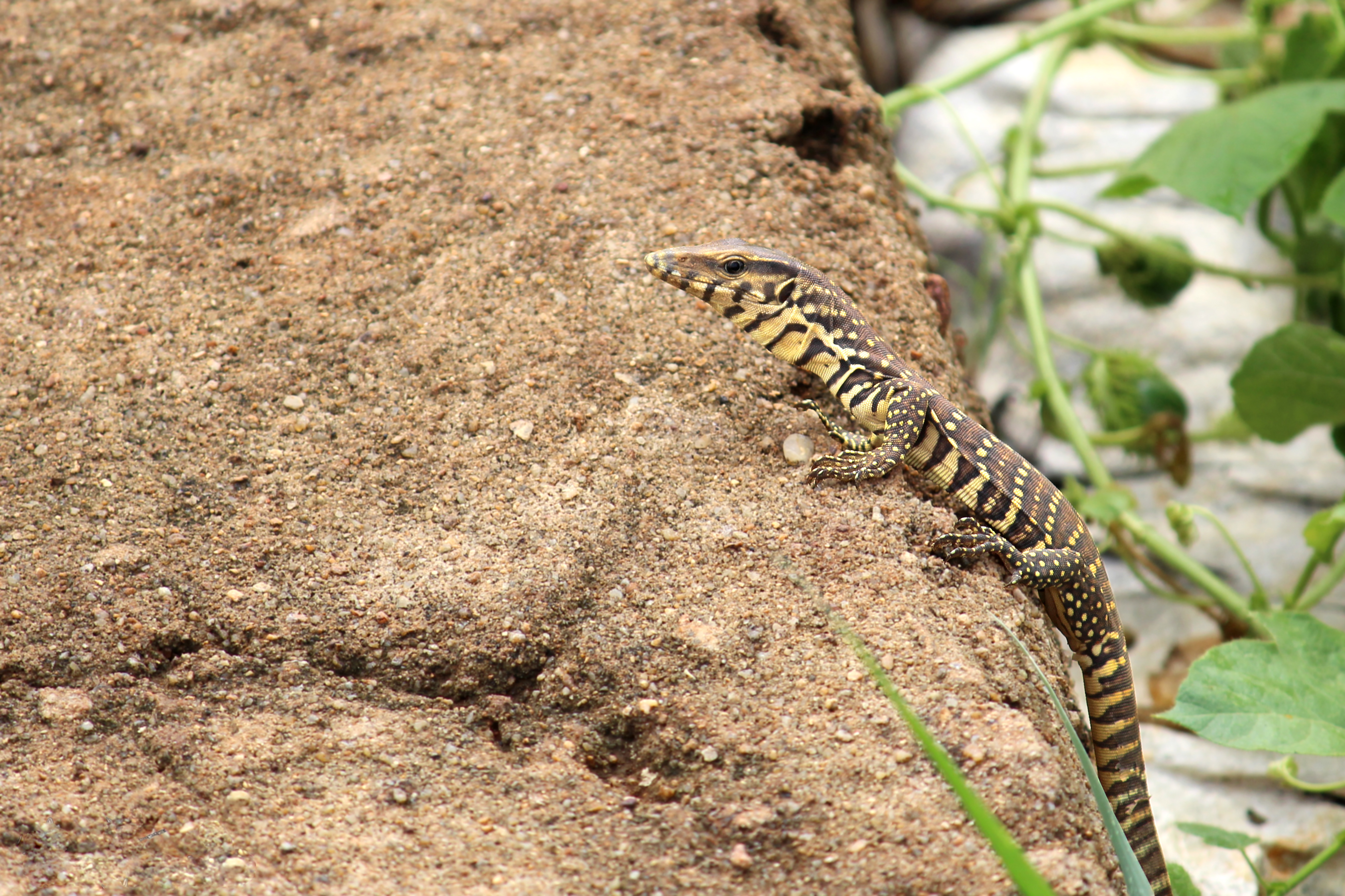 Bengal Monitor (Varanus bengalensis) Juvenile.